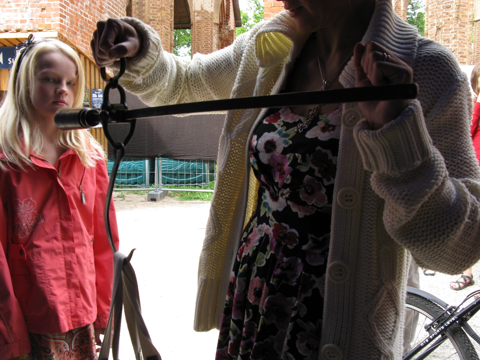 Margapuu kasutamise õpetus Eesti Rahva Muuseumi õpitoas "Mõõdu tunne" Tartu hansapäevade Teaduslinnas, 20. juuli 2012. Foto: Oop.